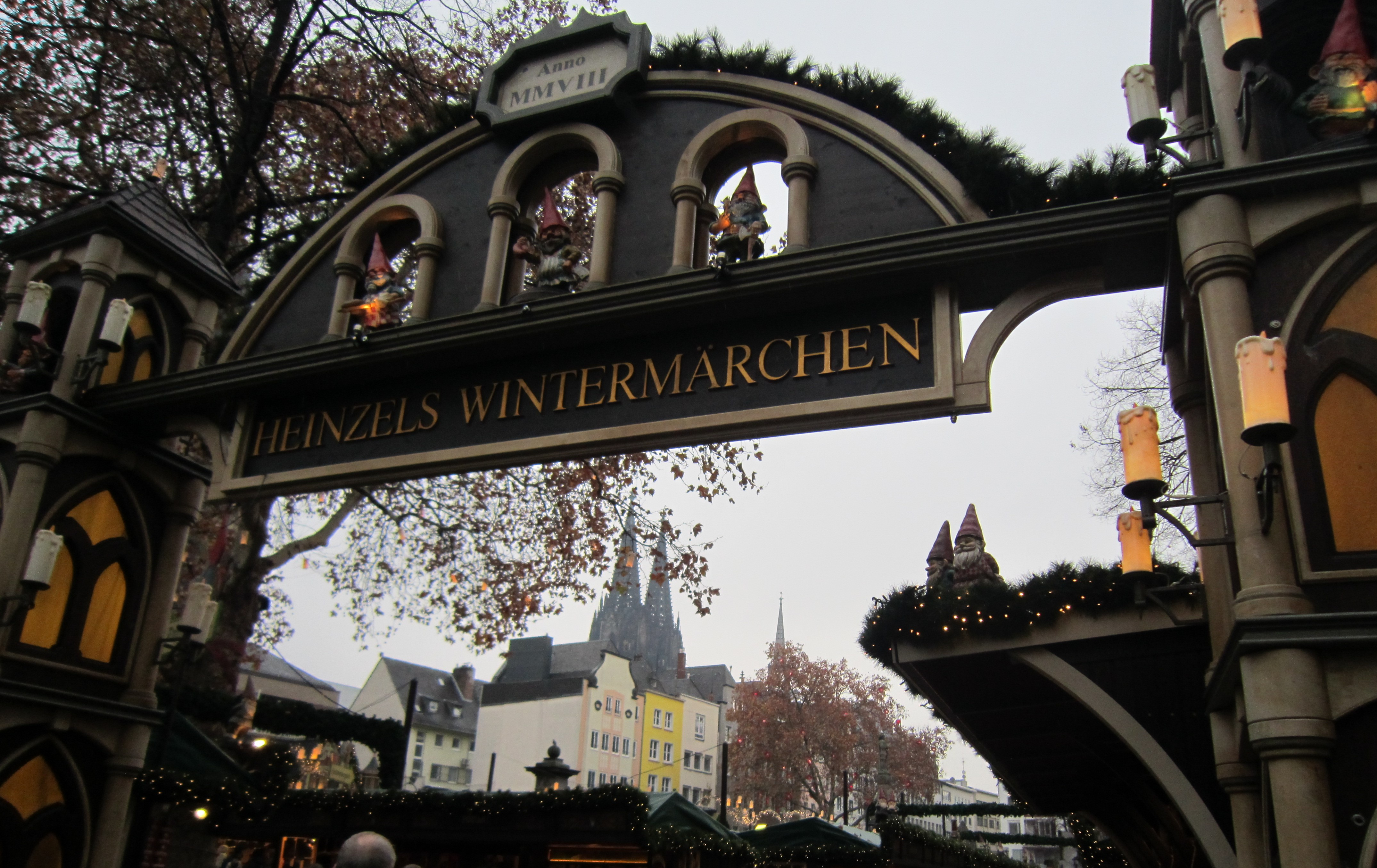 "Heinzels Wintermärchen" - Weihnachtsmarkt auf dem Heumarkt / Alter Markt in Köln